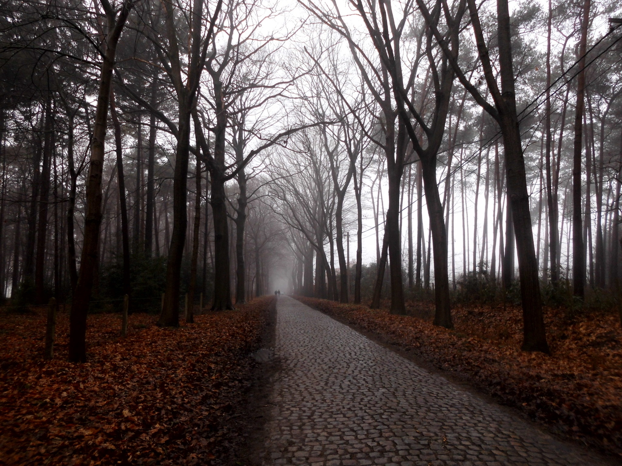 Antwerpse Heirweg - Assenede - Oost-Vlaanderen - België